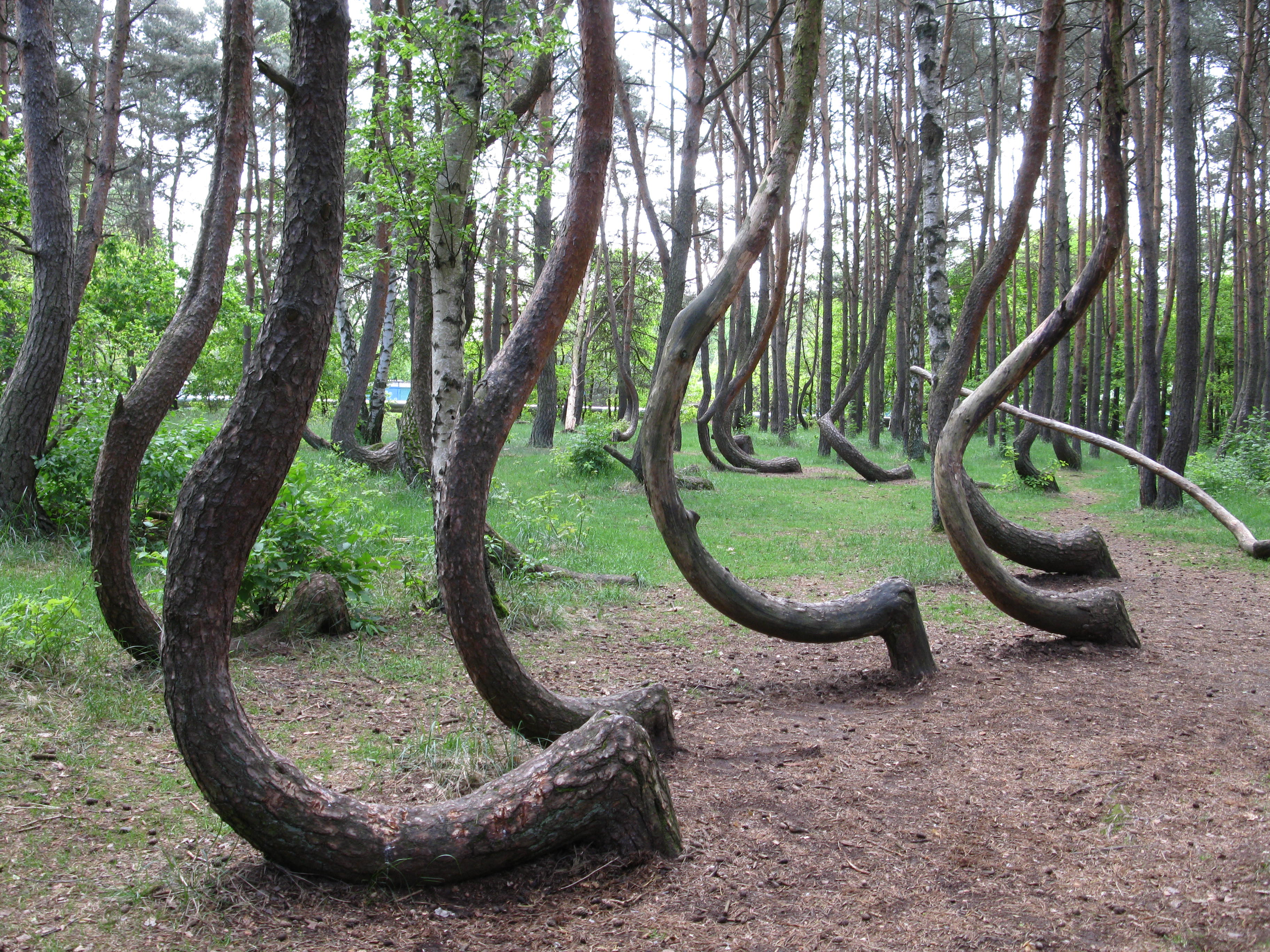 Krzywy Las w Nowym Czarnowie